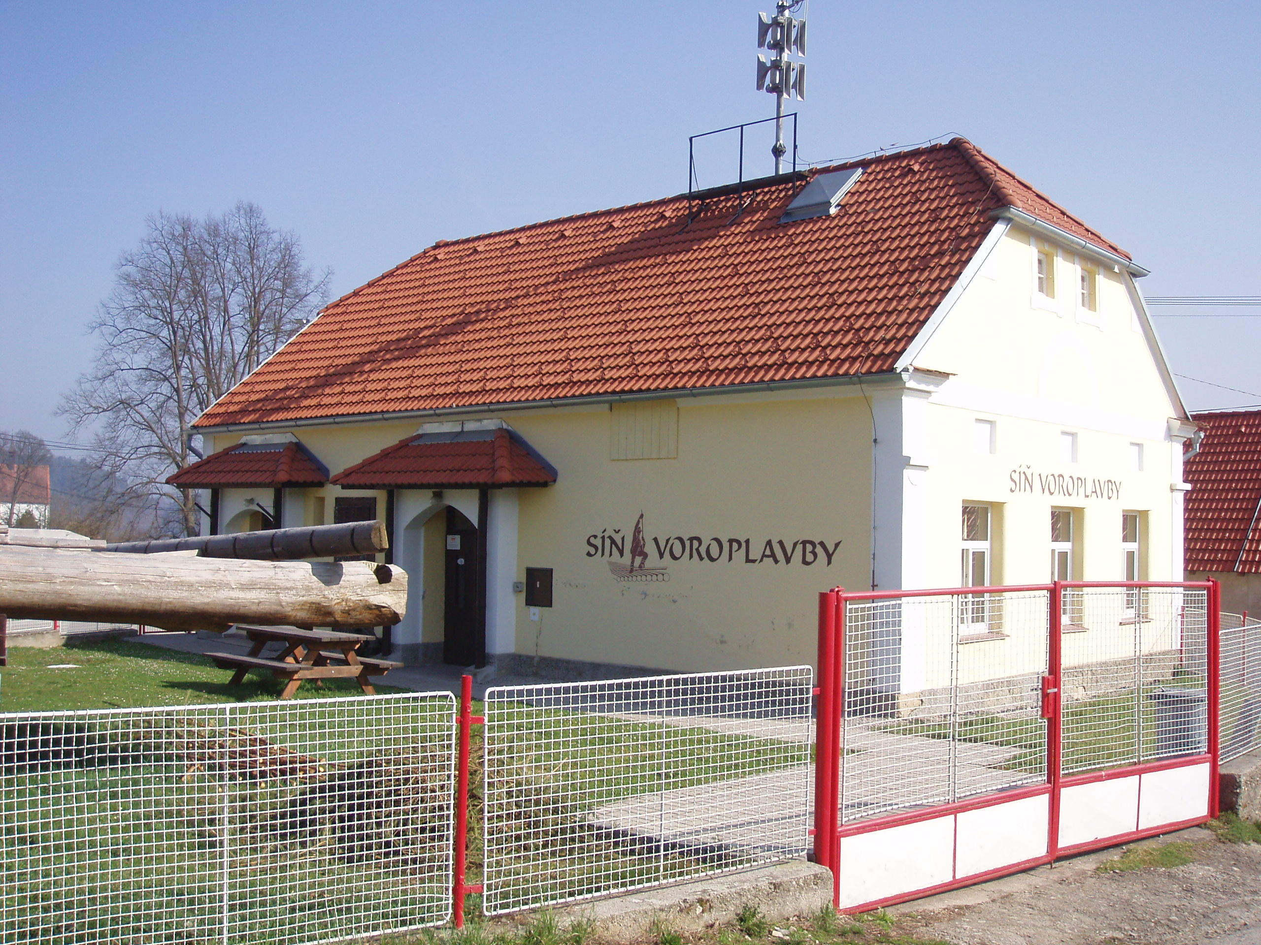 Purkarec - museum vorařství